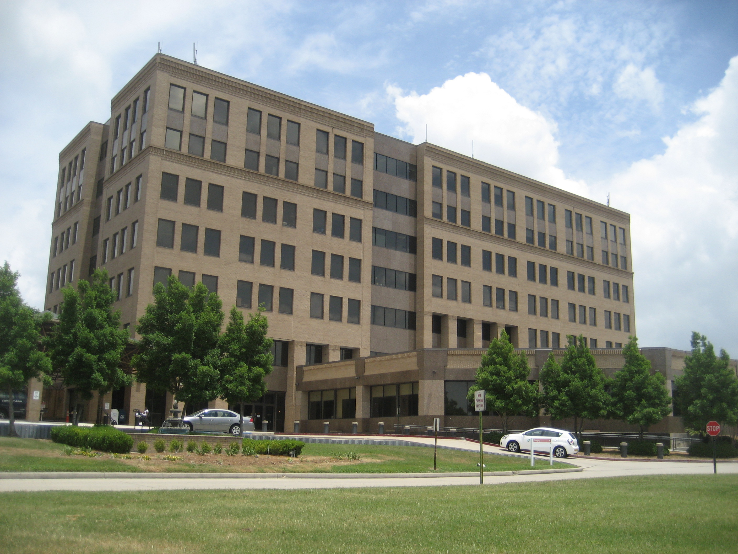 Kenner, Louisiana.